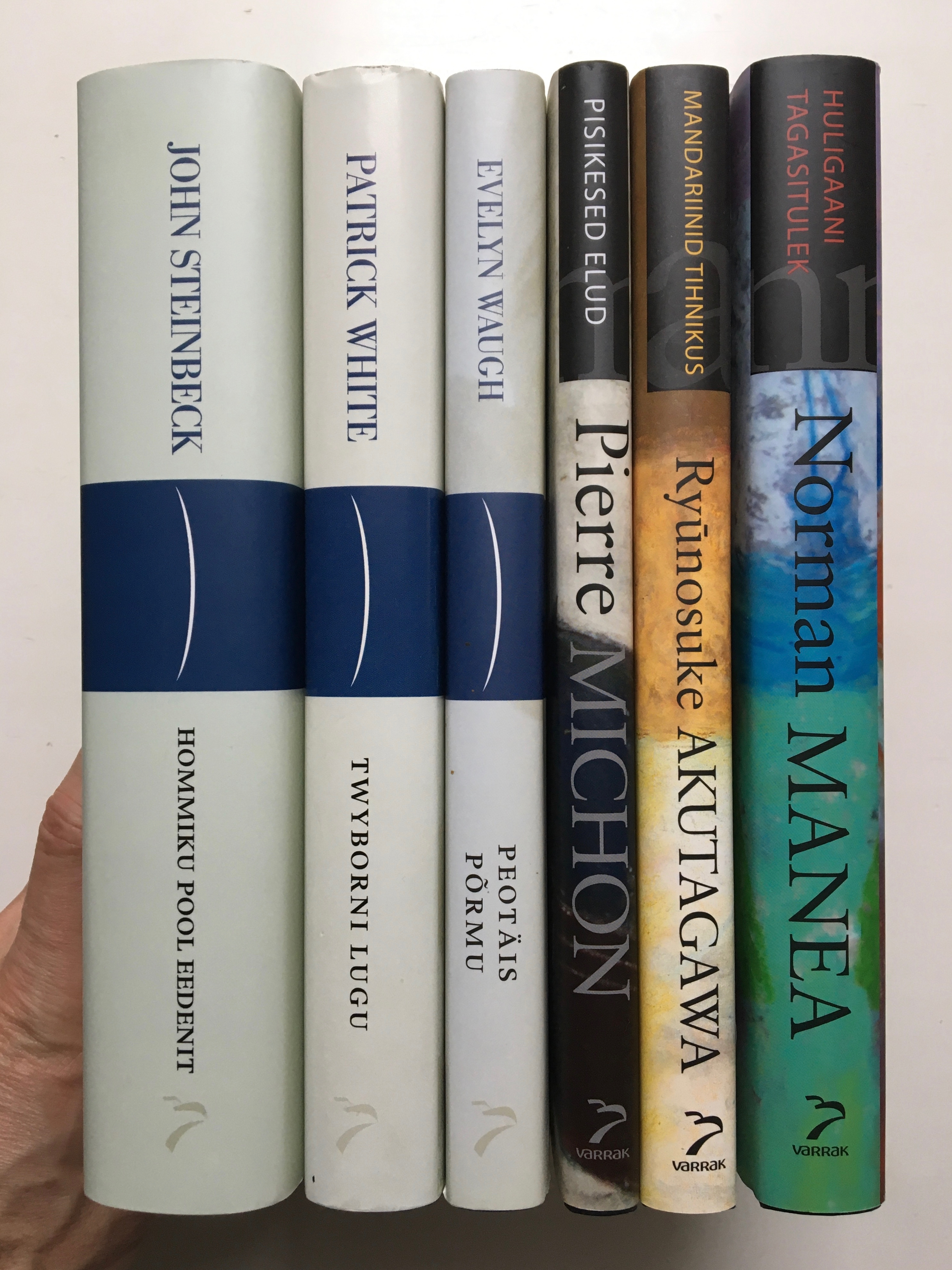 20. saj seljad